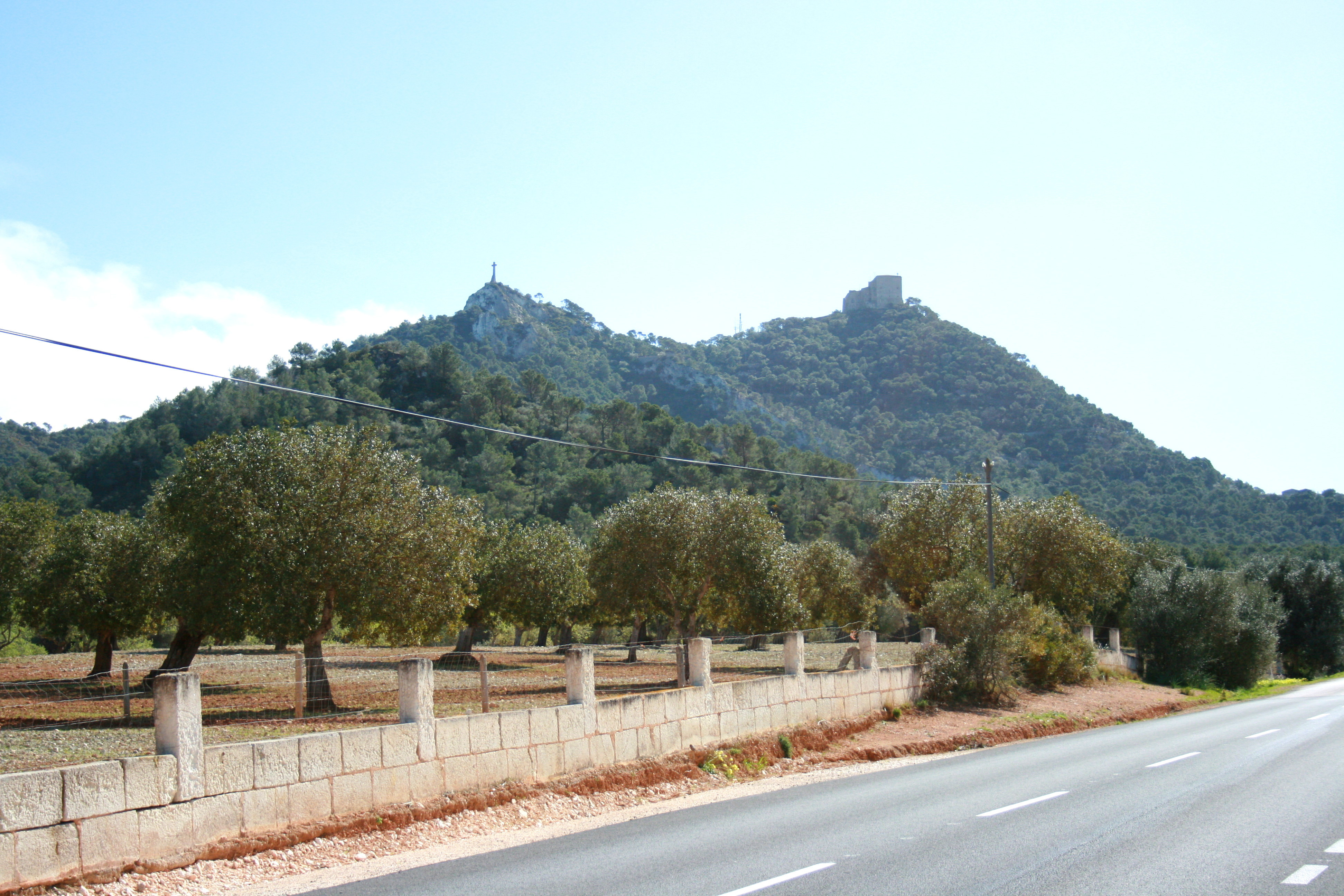 Puig de Sant Salvador (right) and Puig des Milà (left) in Felanitx